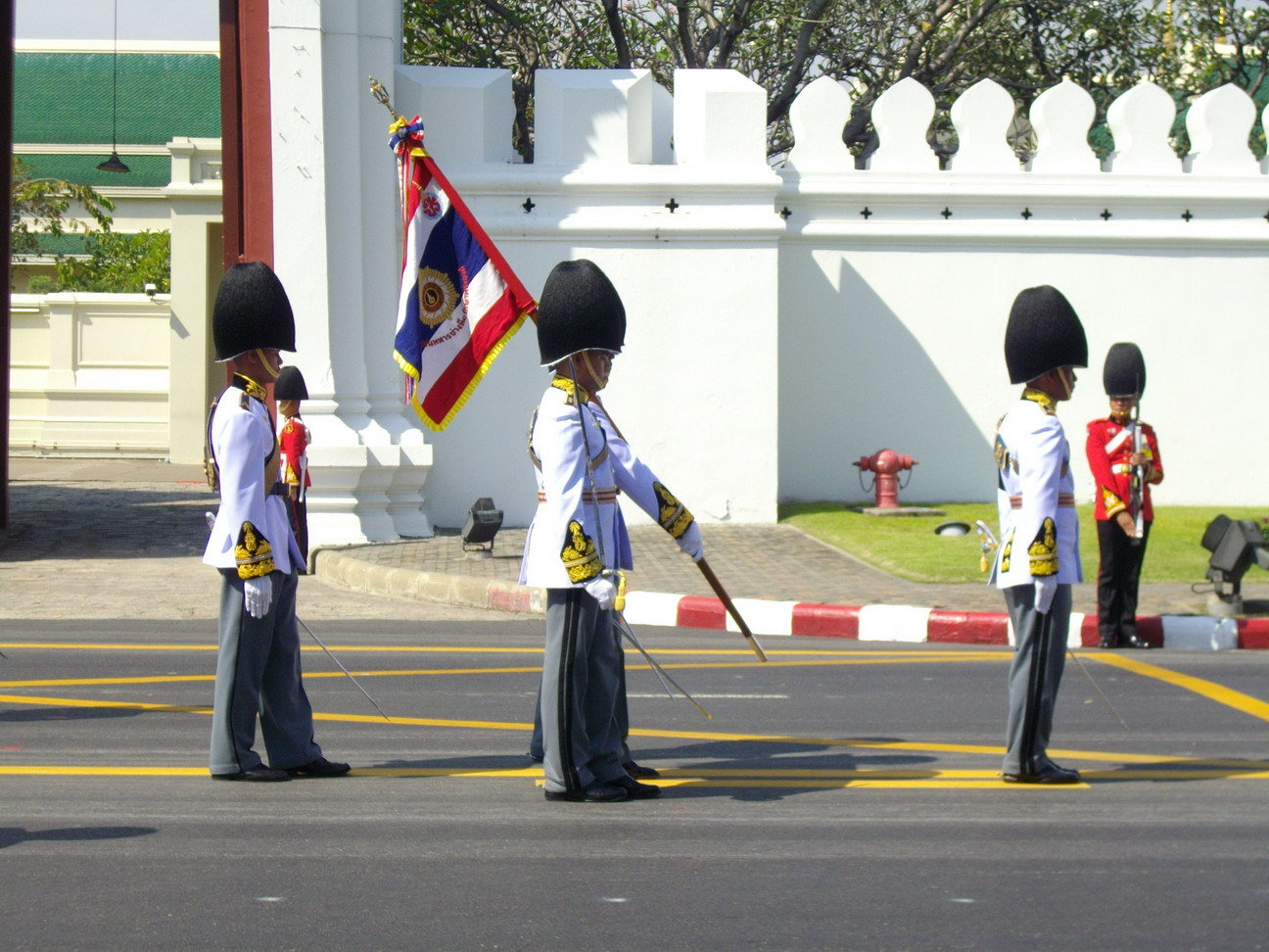 หมู่เชิญธงชัยเฉลิมพลของกองพันทหารช่างที่ 1 รักษาพระองค์ ในริ้วกระบวนเชิญพระศพสมเด็จพระเจ้าพี่นางเธอ เจ้าฟ้ากัลยานิวัฒนา กรมหลวงนราธิวาสราชนครินทร์ ริ้วกระบวนที่ 2 หน้าพระที่นั่งสุทไธสวรรยปราสาท ถนนสนามไชย วันที่ 15 พฤศจิกายน พ.ศ. 2551